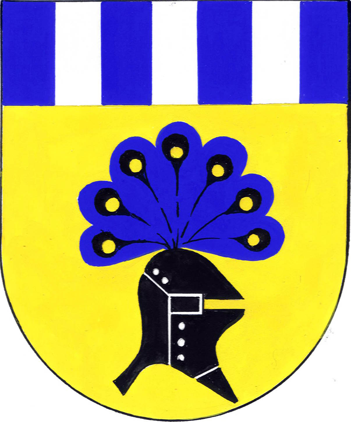 Znak obce Bořice (okres Chrudim)